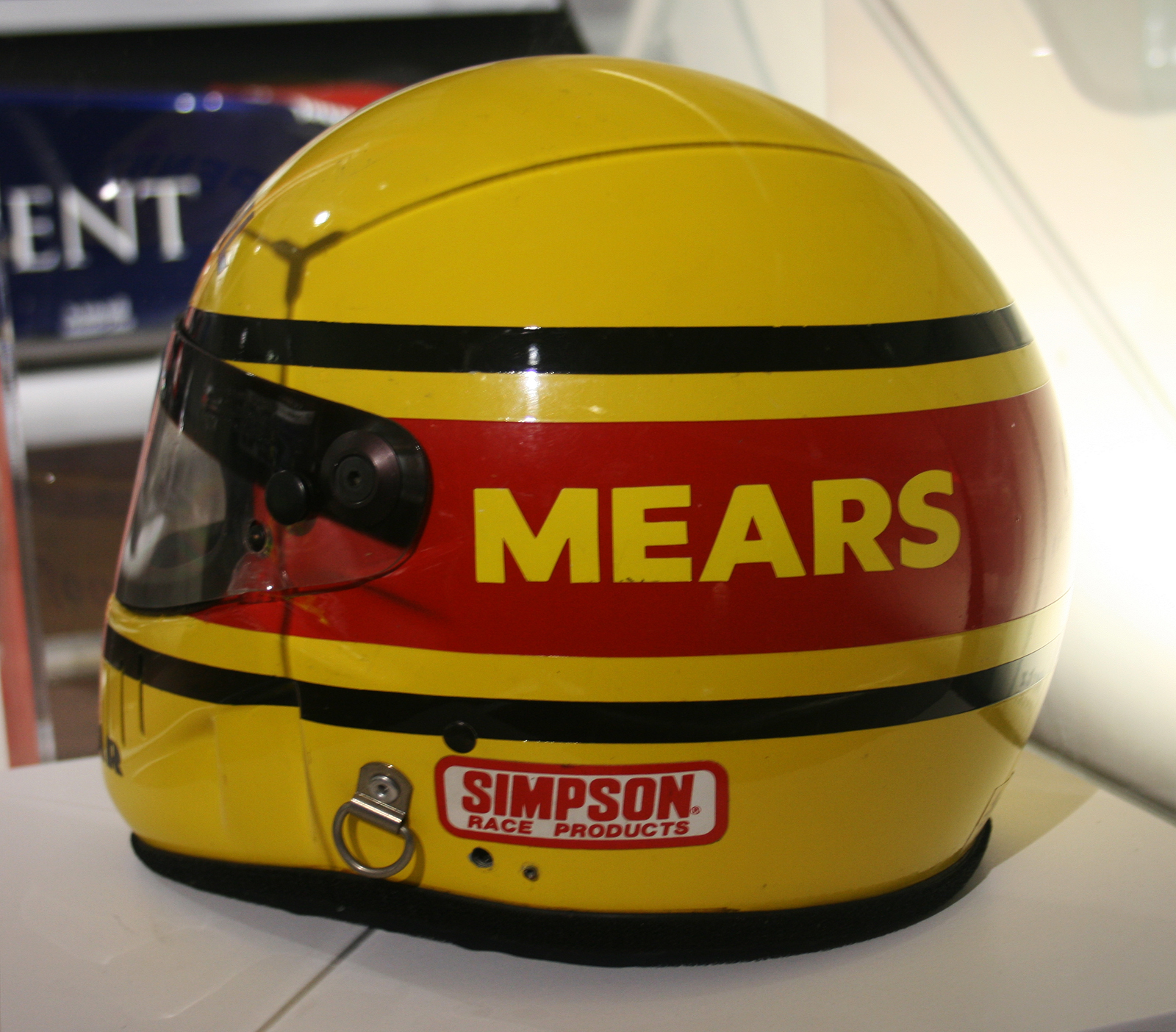 Rick Mears' Pennzoil helmet.